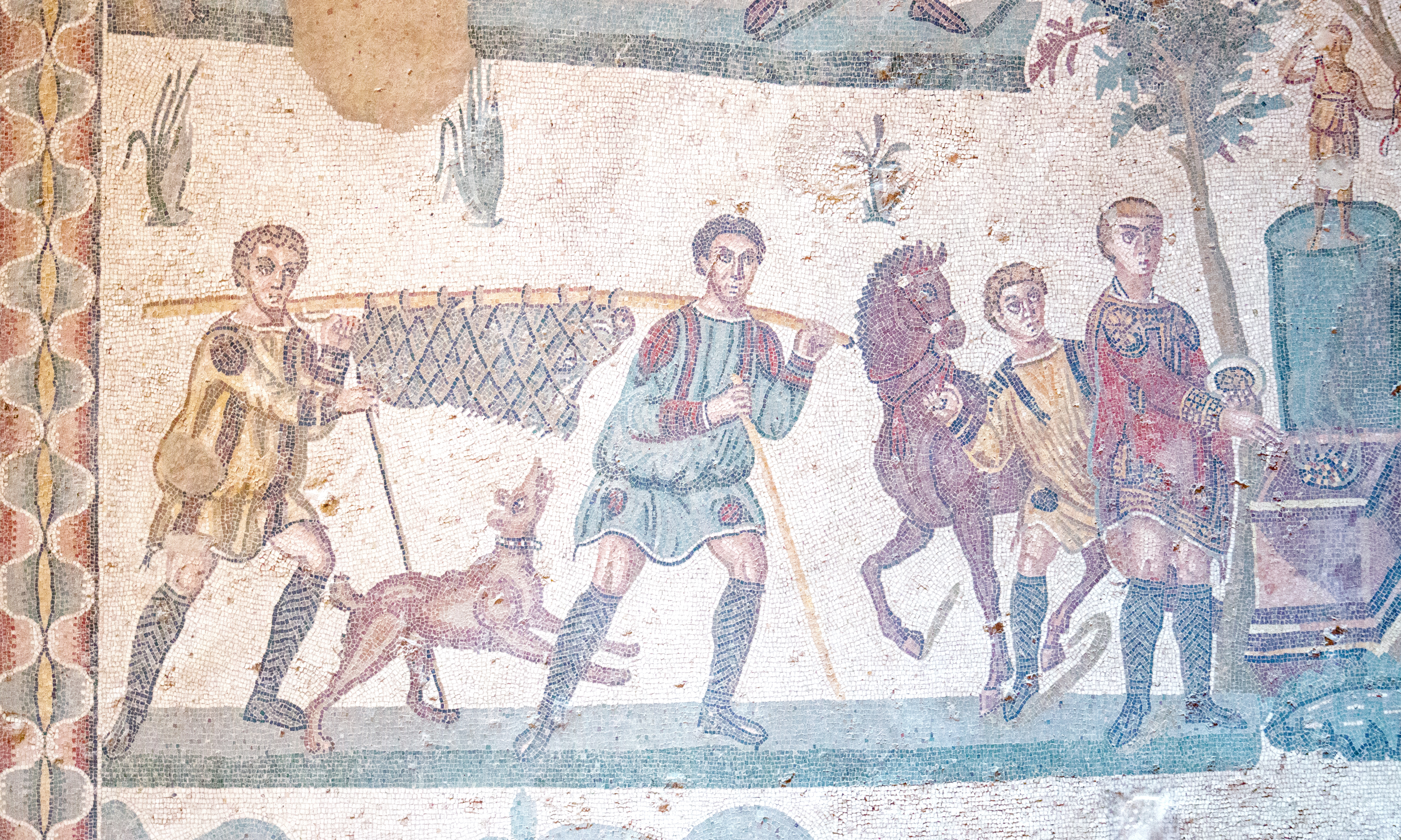 Villa Romana del Casale